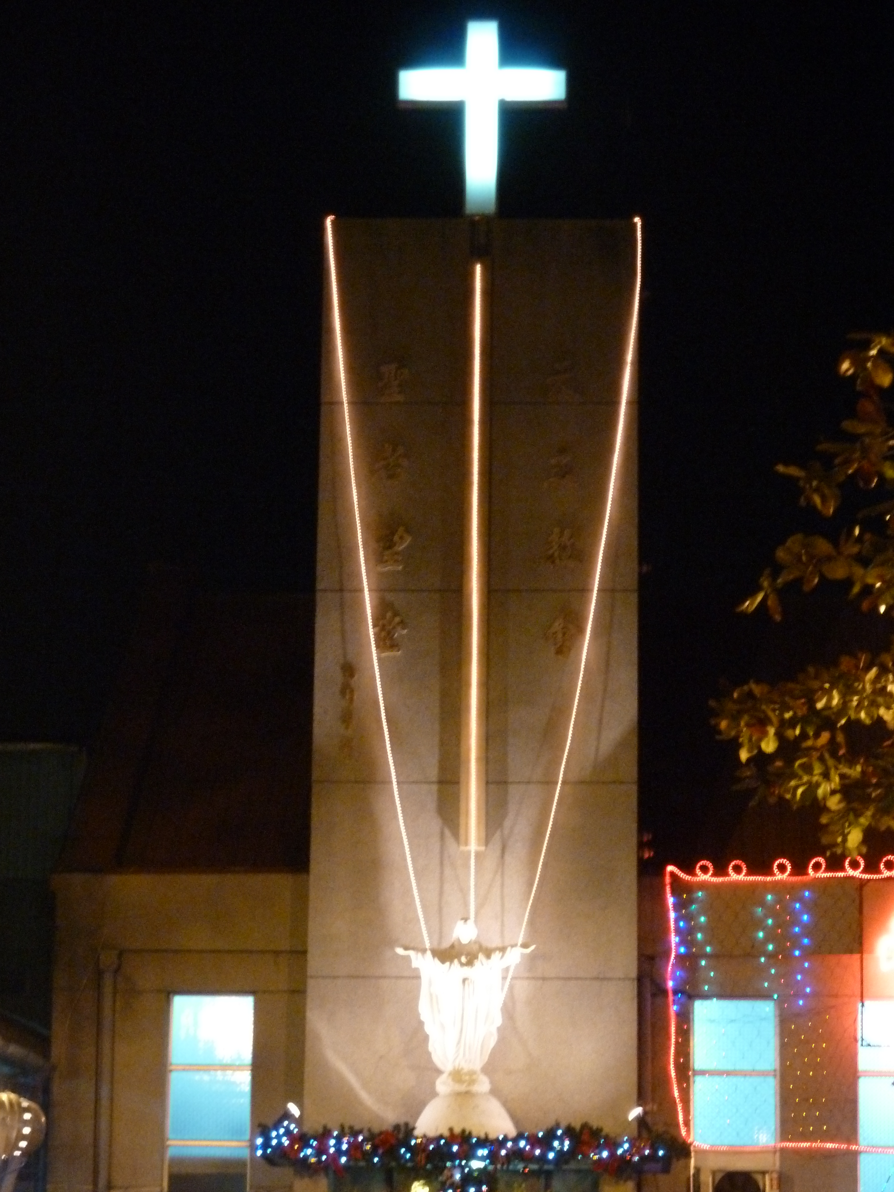 嘉義聖若望主教座堂右側入口夜景